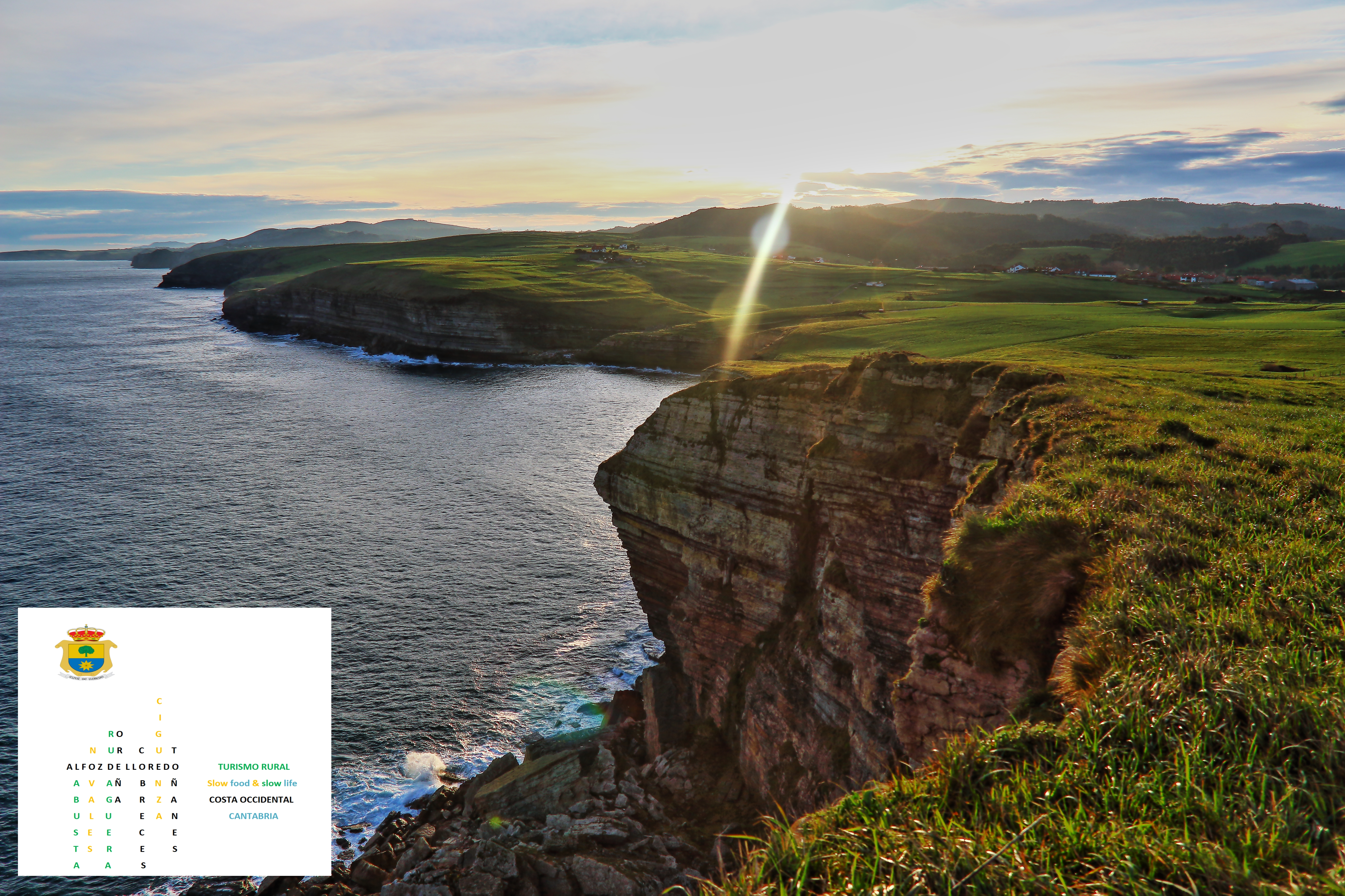 ACANTILADOS DE TOÑANES DESDE COBRECES.